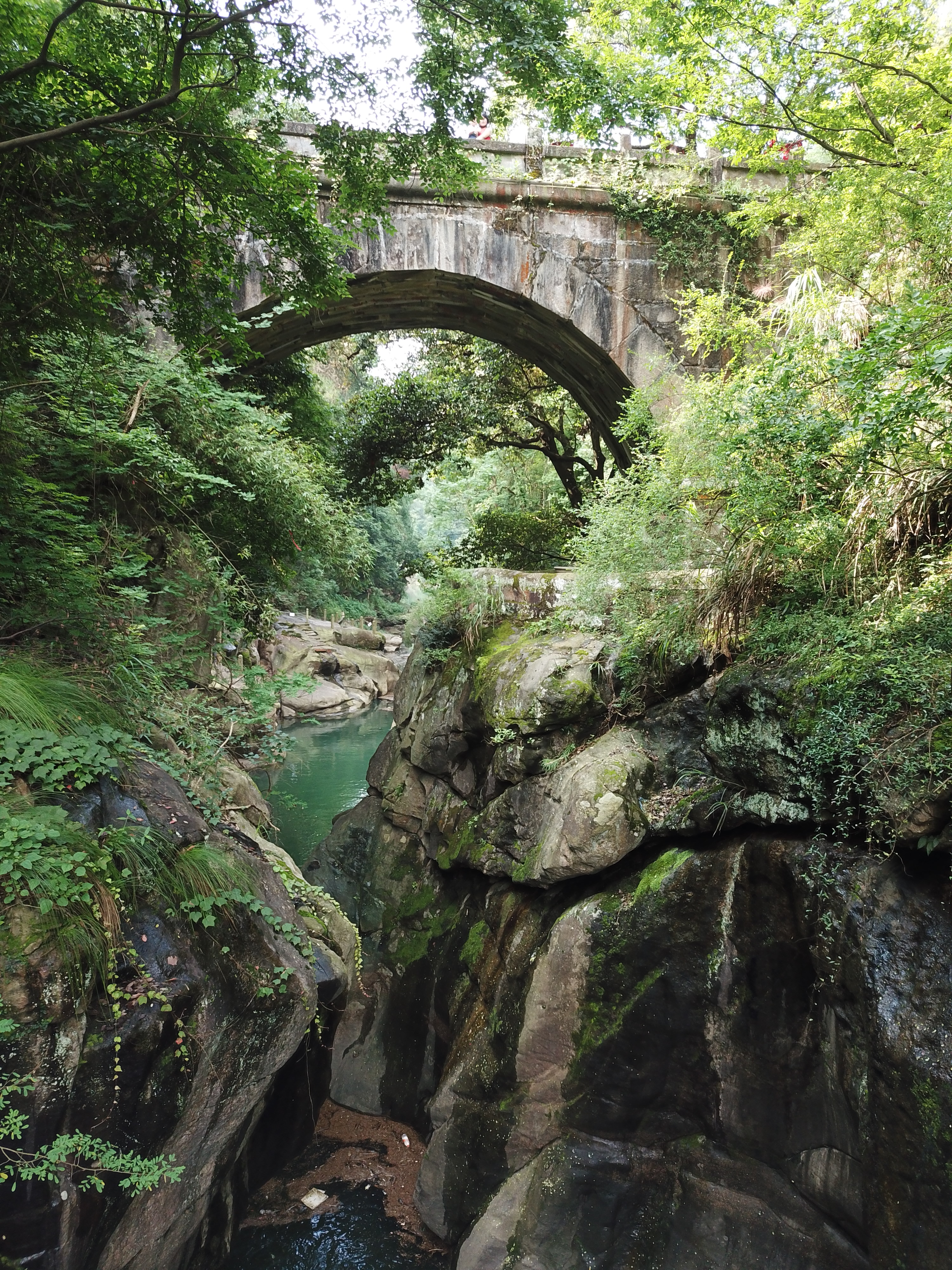 庐山·观音桥 北面